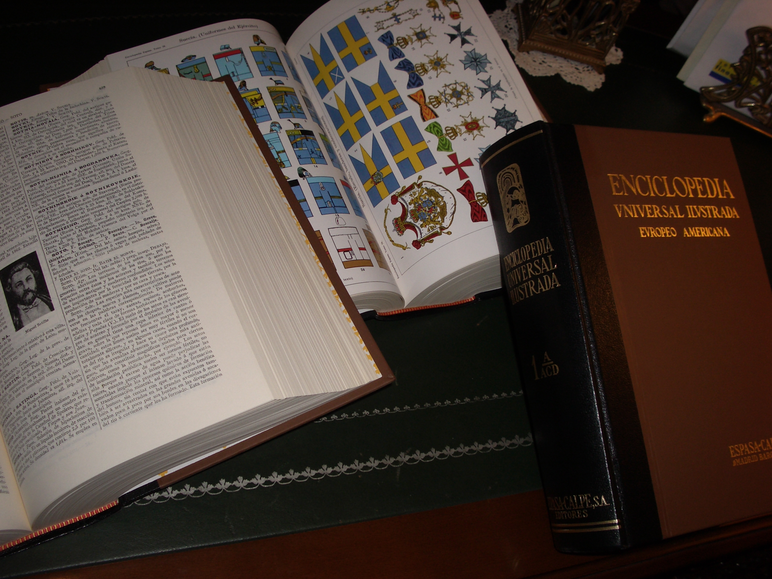 Varios tomos abiertos de la Enciclopedia Universal Ilustrada Europeo-Americana, de Editorial Espasa-Calpe.